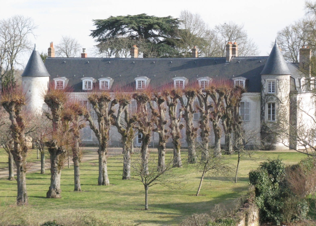 Château de La Chapelle Saint-Mesmin (Loiret) Auteur : Marinette BONNIER